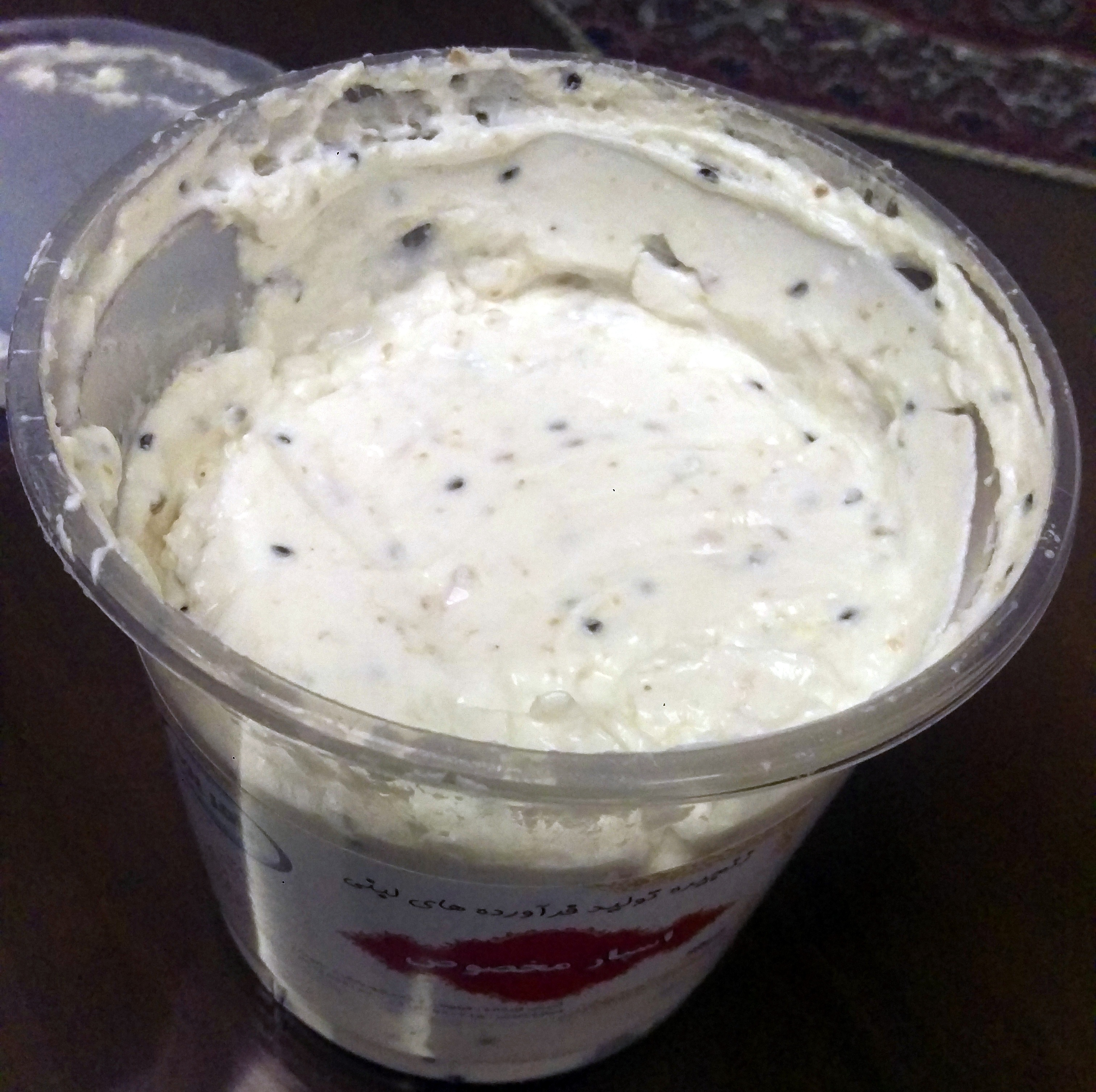 نوعی ماست تهیه شده از دوغ در شهربابک